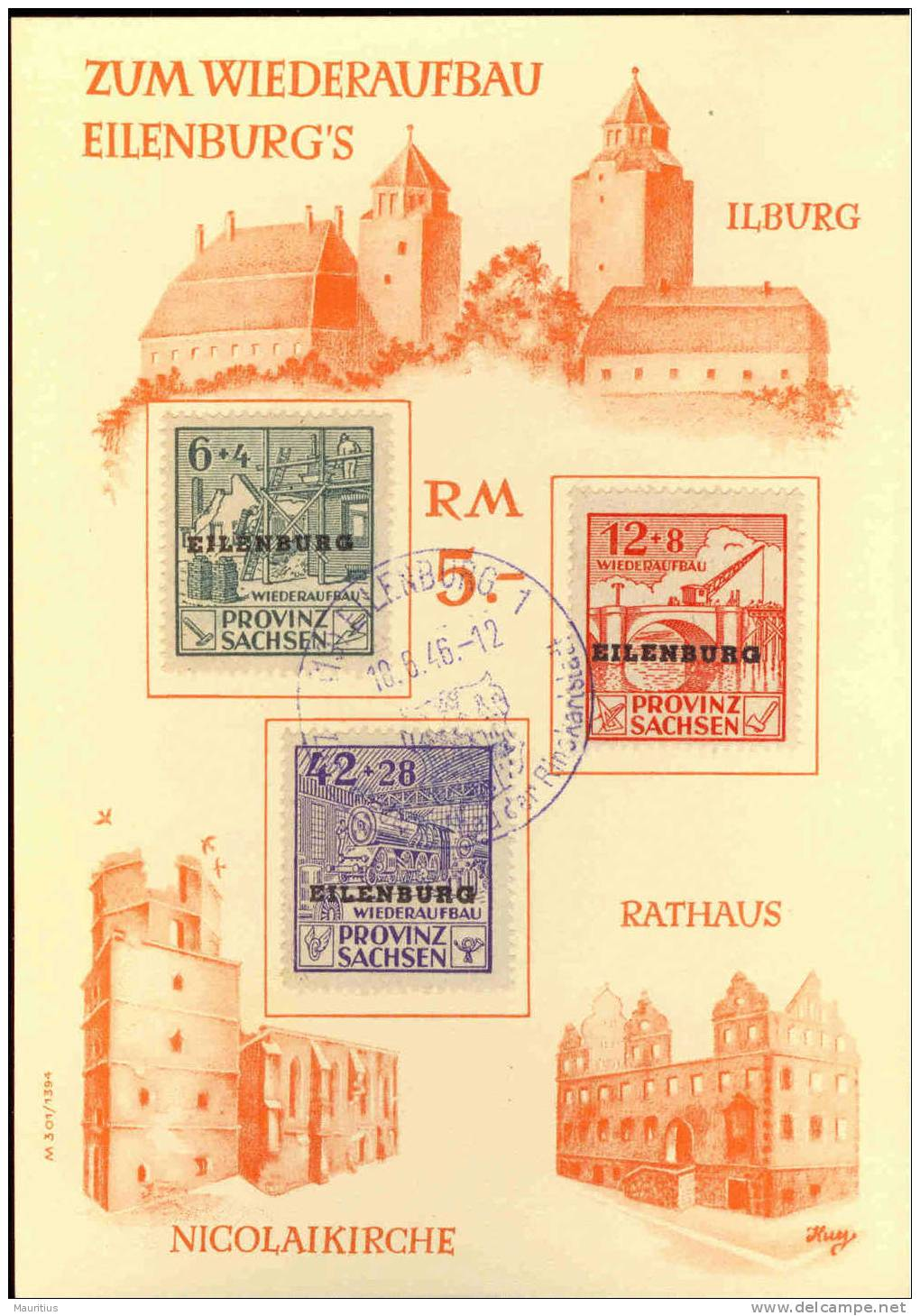 Листок первого дня с почтово-благотворительными марками провинции Саксония, с надпечаткой города Айленбург